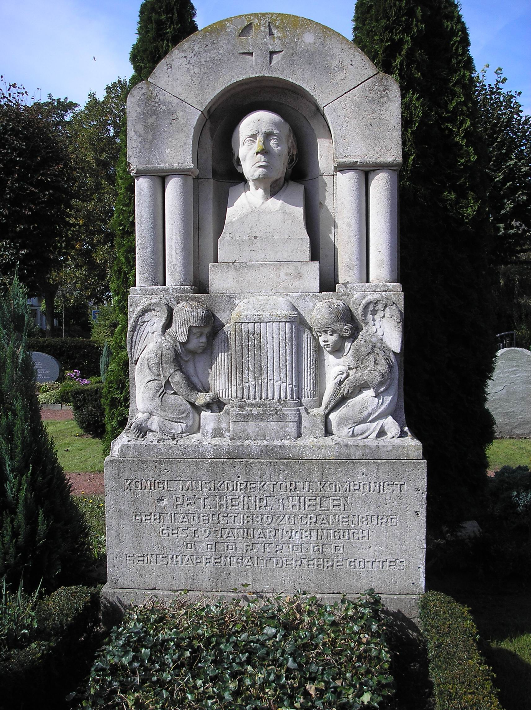 Grabmal des Komponisten Peter Heinrich Thielen auf dem Friedhof von Kranenburg